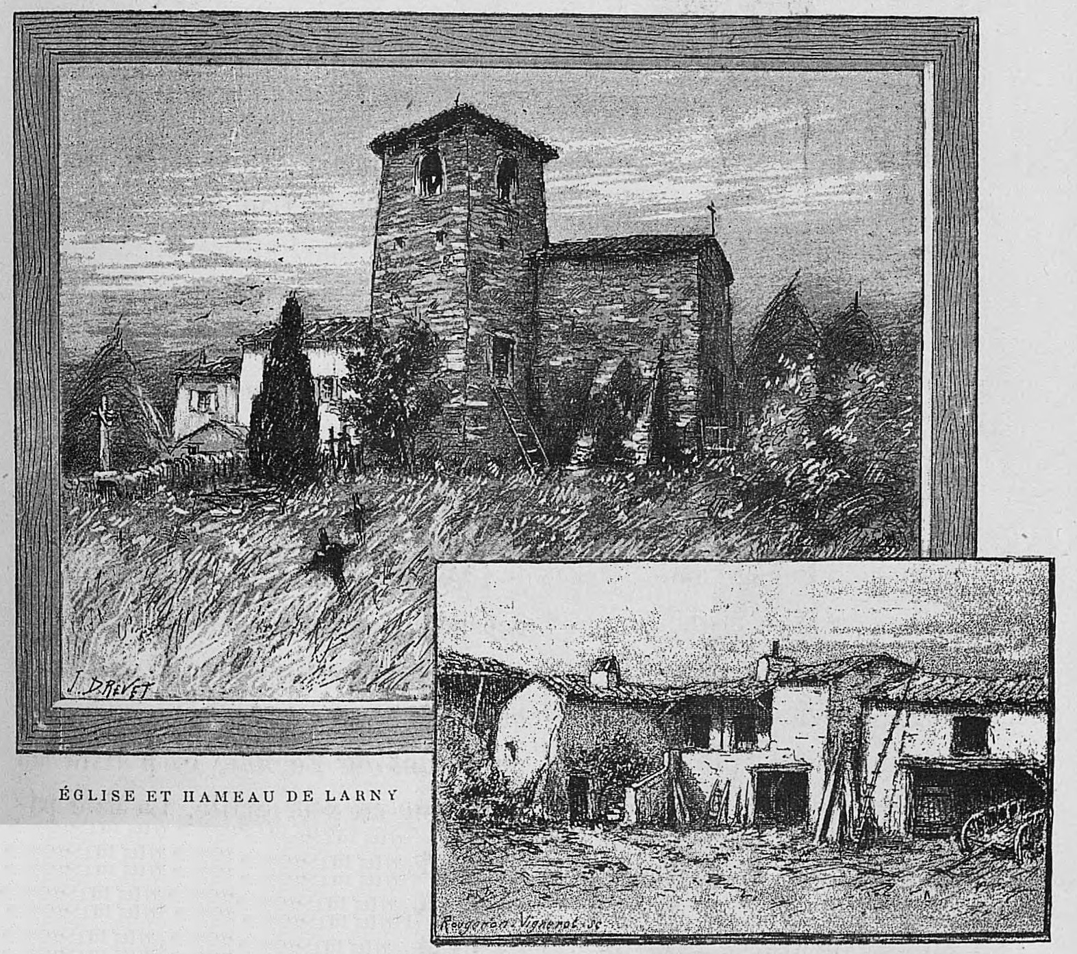 Aux environs de Lyon / Monsieur Josse ; préface de M. Coste-Labaume ; édition illustrée de 250 dessins de J. Drevet.